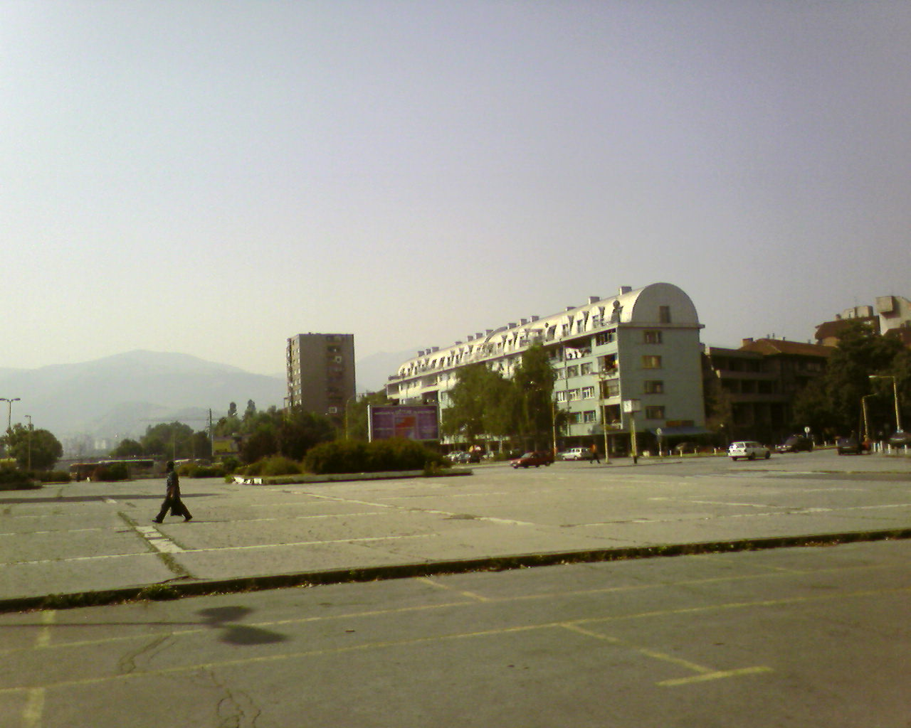 Deze foto heb ik zelf gemaakt met mijn mobieltje, Samsung SGH-E730!